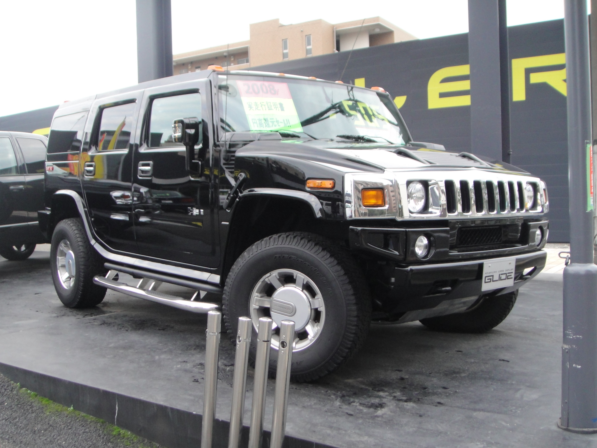 HUMMER H2 Front